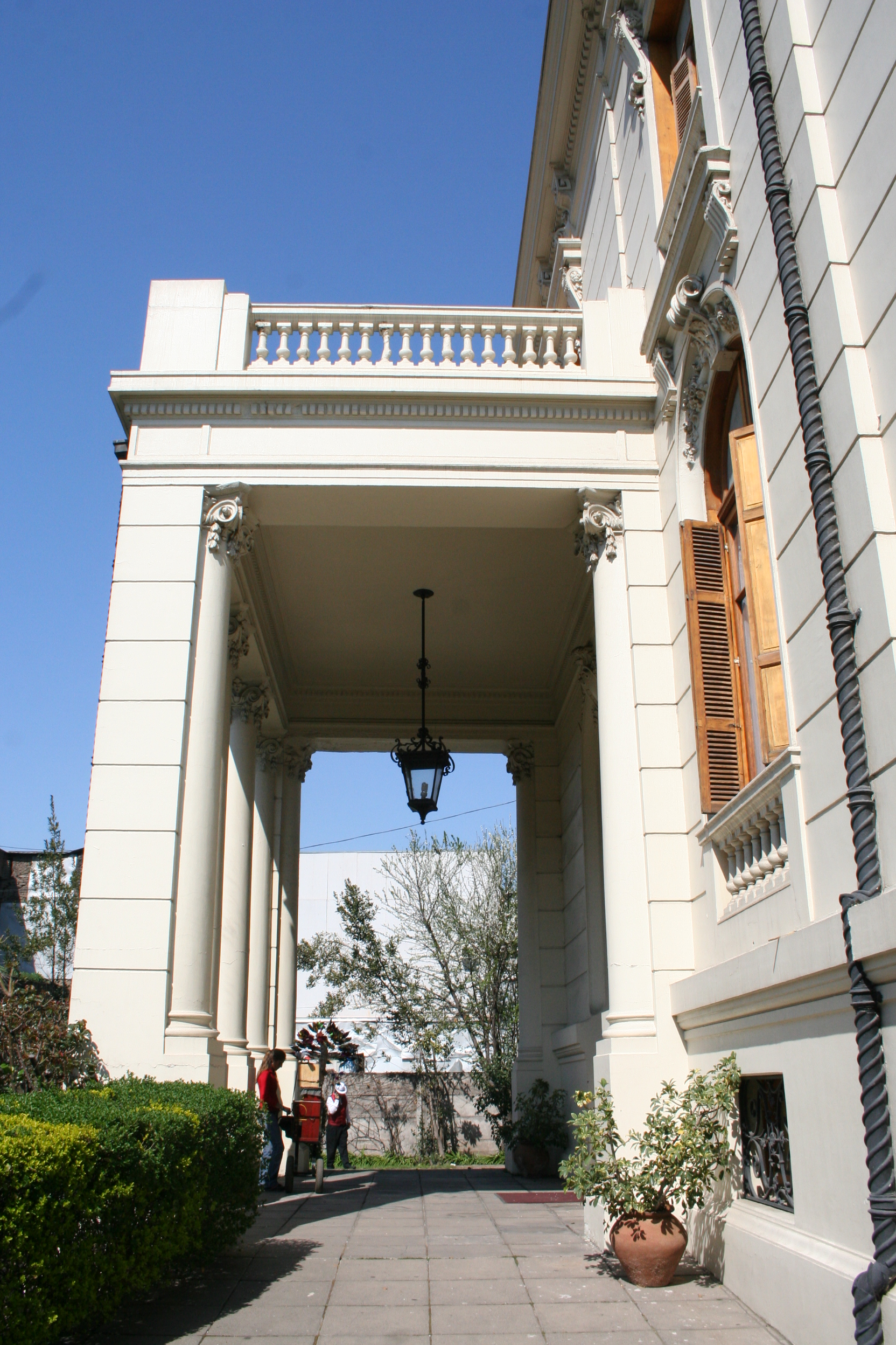 Entrada del Palacio Astoreca. This is a photo of a national monument in Chile: 92